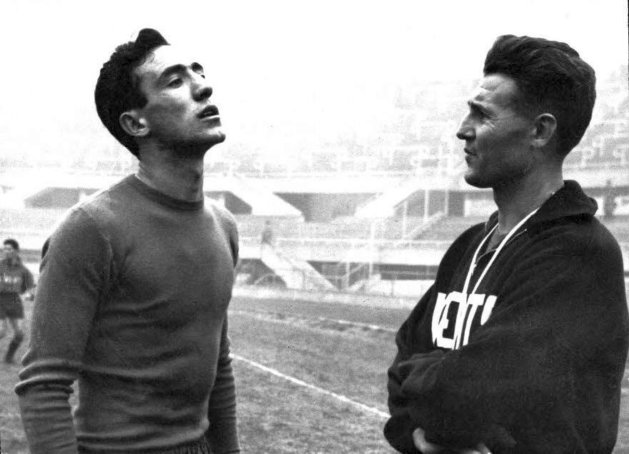 Torino, stadio Comunale, 1950. György Sárosi (left) Giuseppe Corradi (right).